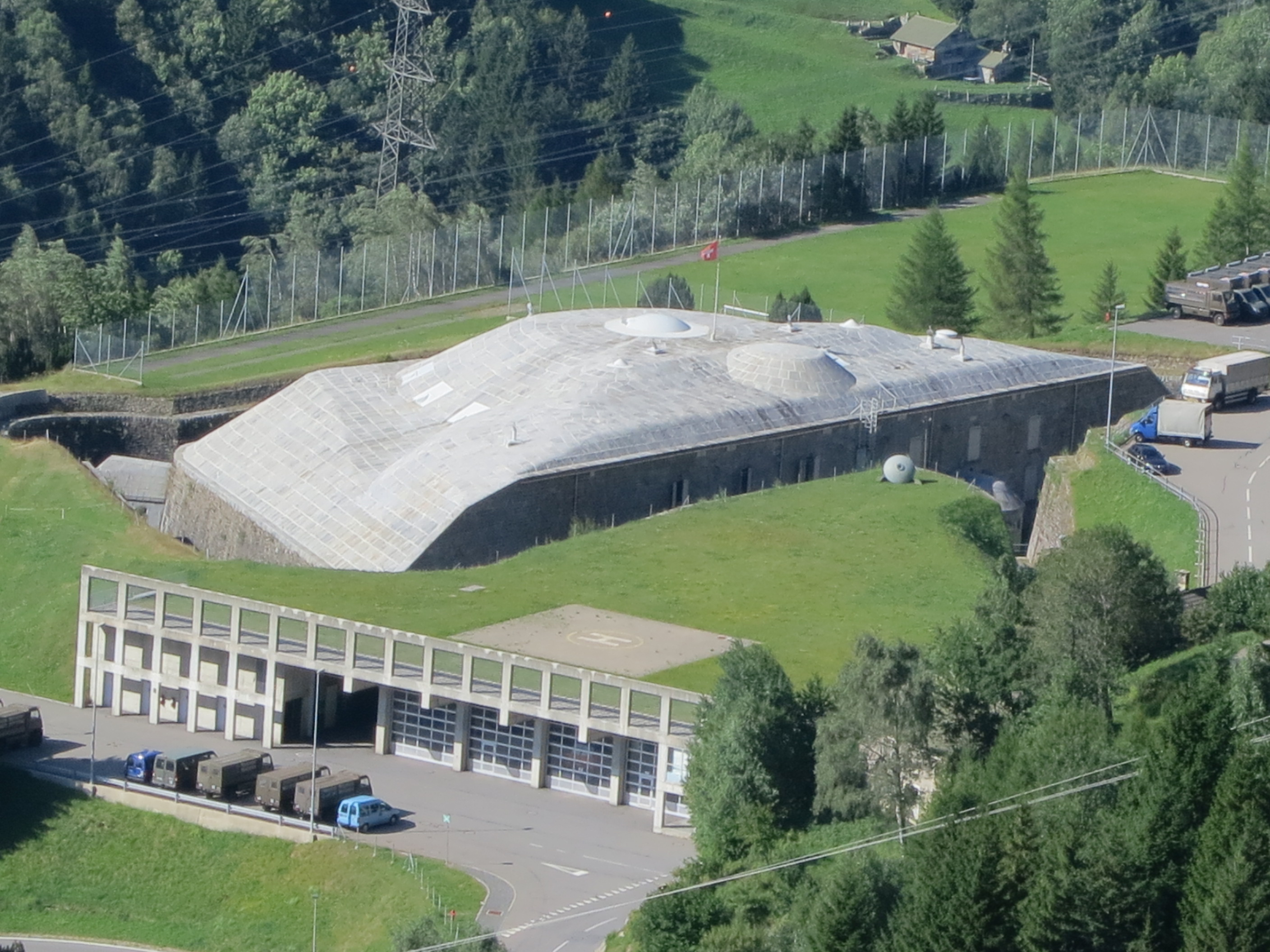 Forte Airolo, Airolo TI, Schweiz